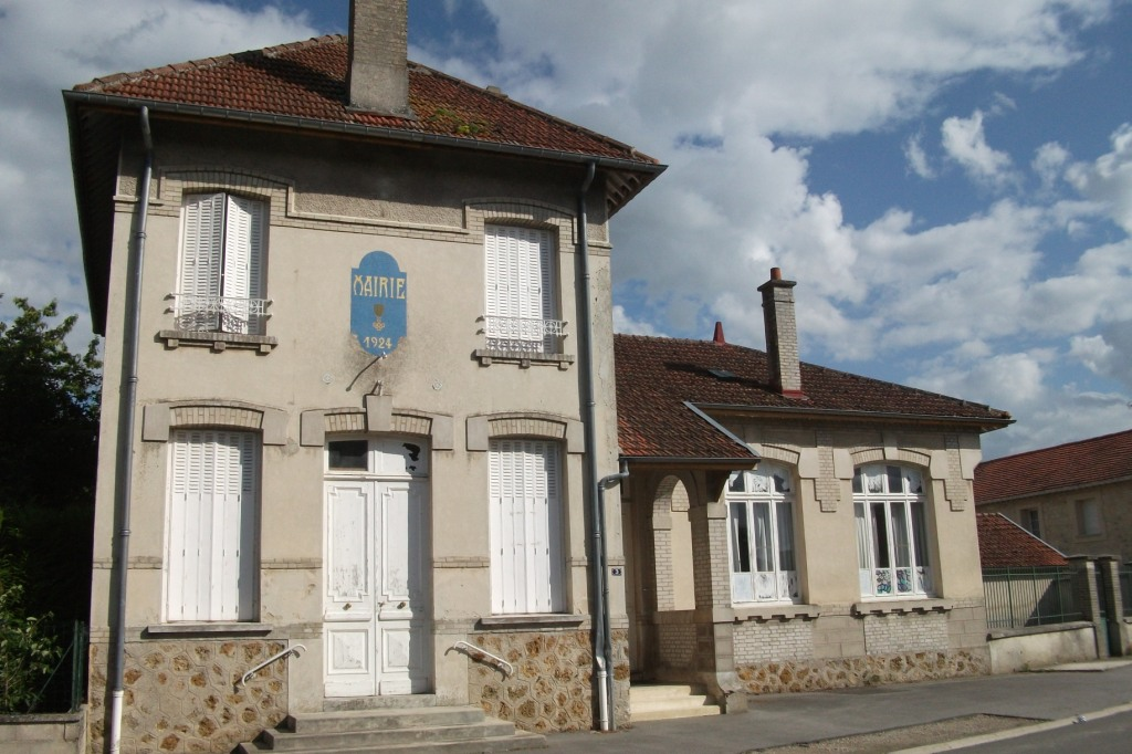 ancienne mairie de Courmelois ayant reçu la croix de guerre 14-14, maintenant une maison privée.